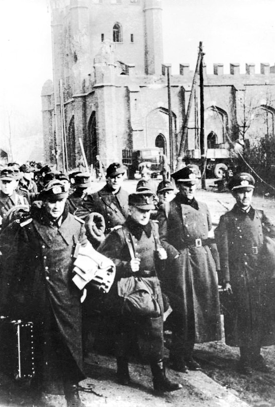 Königsberg, gefangene deutsche Offiziere ADN-ZB II.Weltkrieg 1939-1945 Gefangene Offiziere der deutschen Wehrmacht in den Straßen von Königsberg, am 12. April 1945.